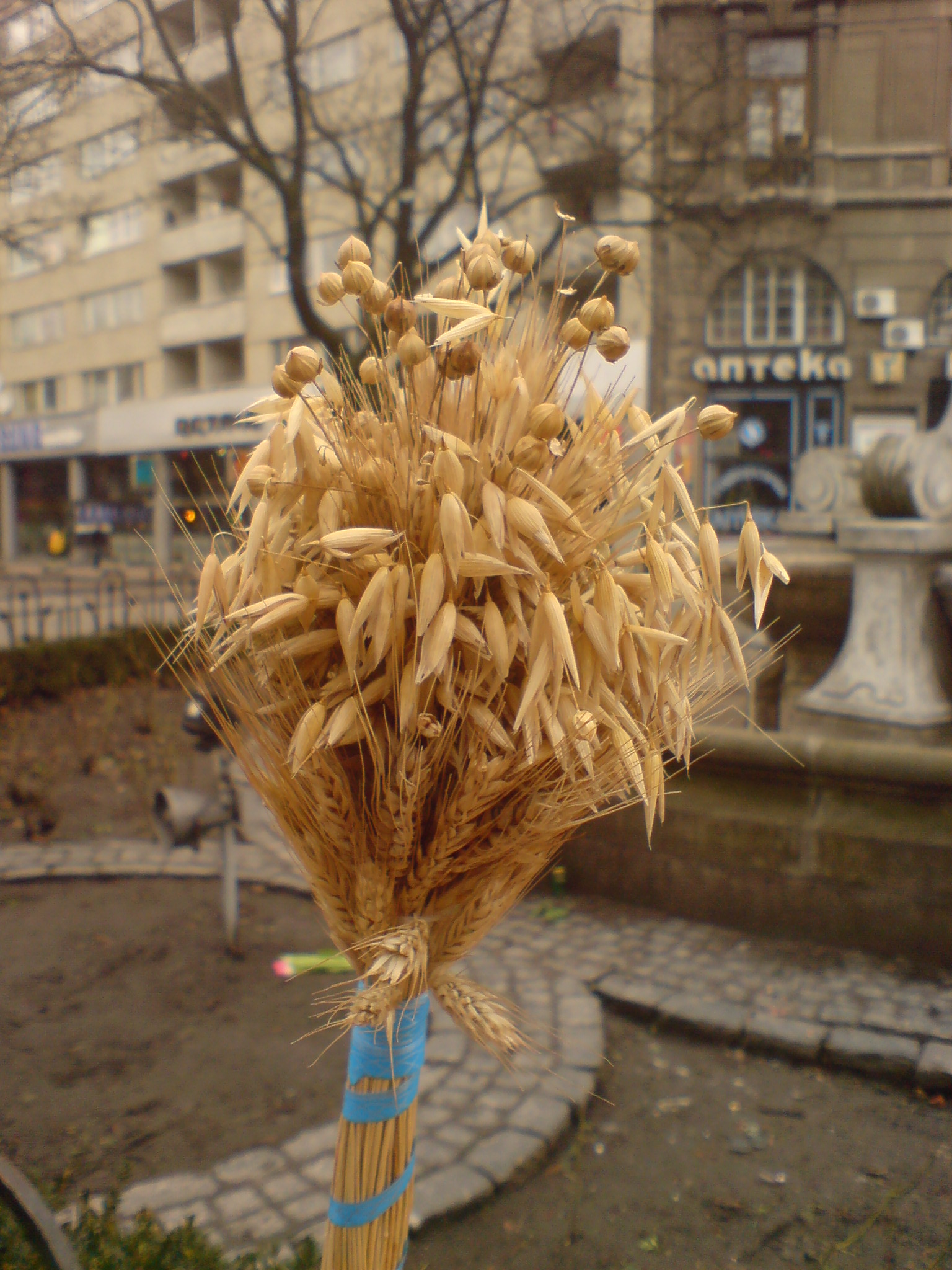 Straw "diduch" in Lviv, Ukraine.